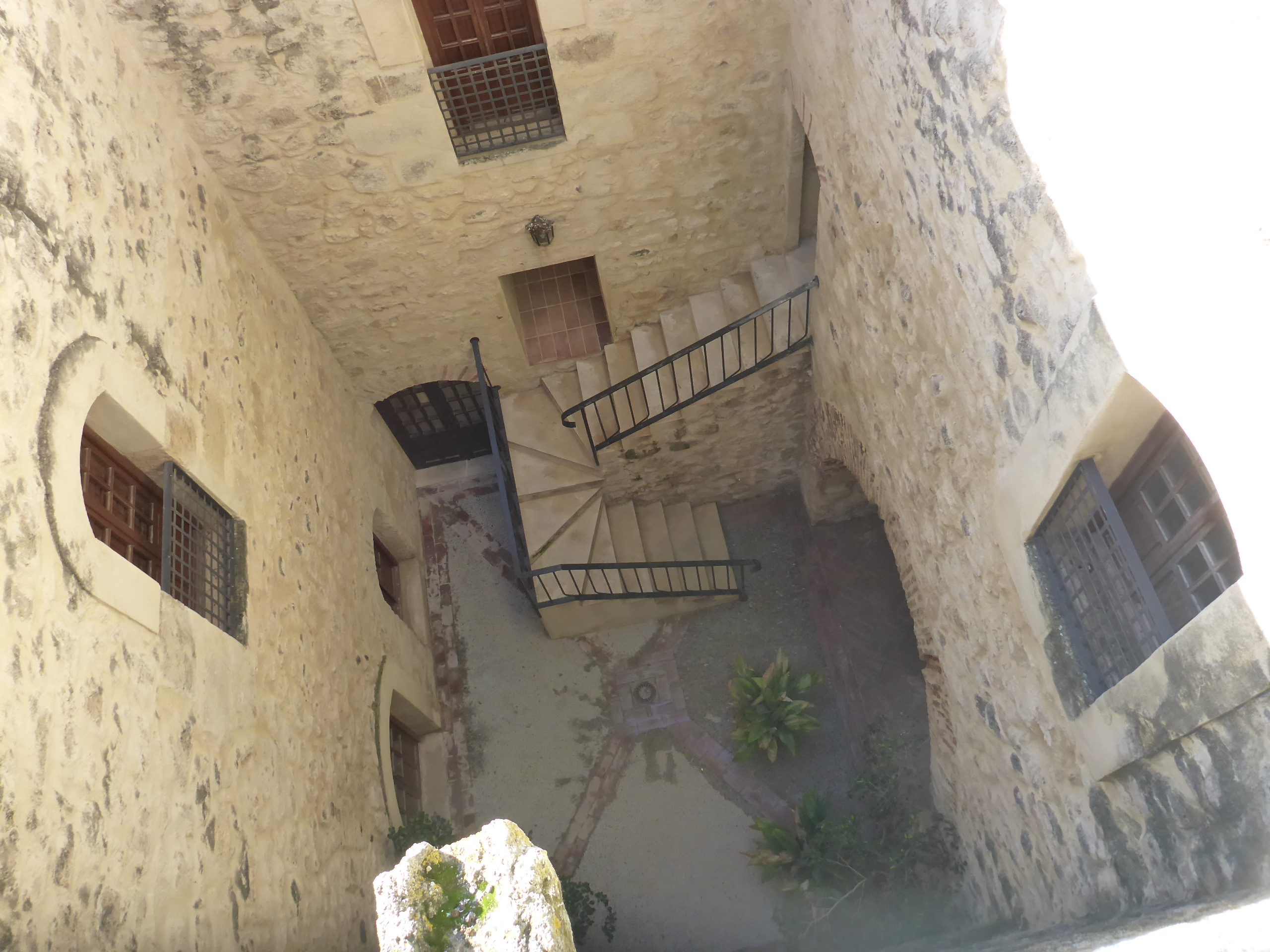 Jardines del Palacio de los Enríquez de Ribera en Bornos (Andalucía, España)